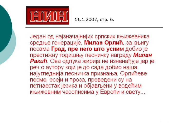 Коментар о добитнику награде